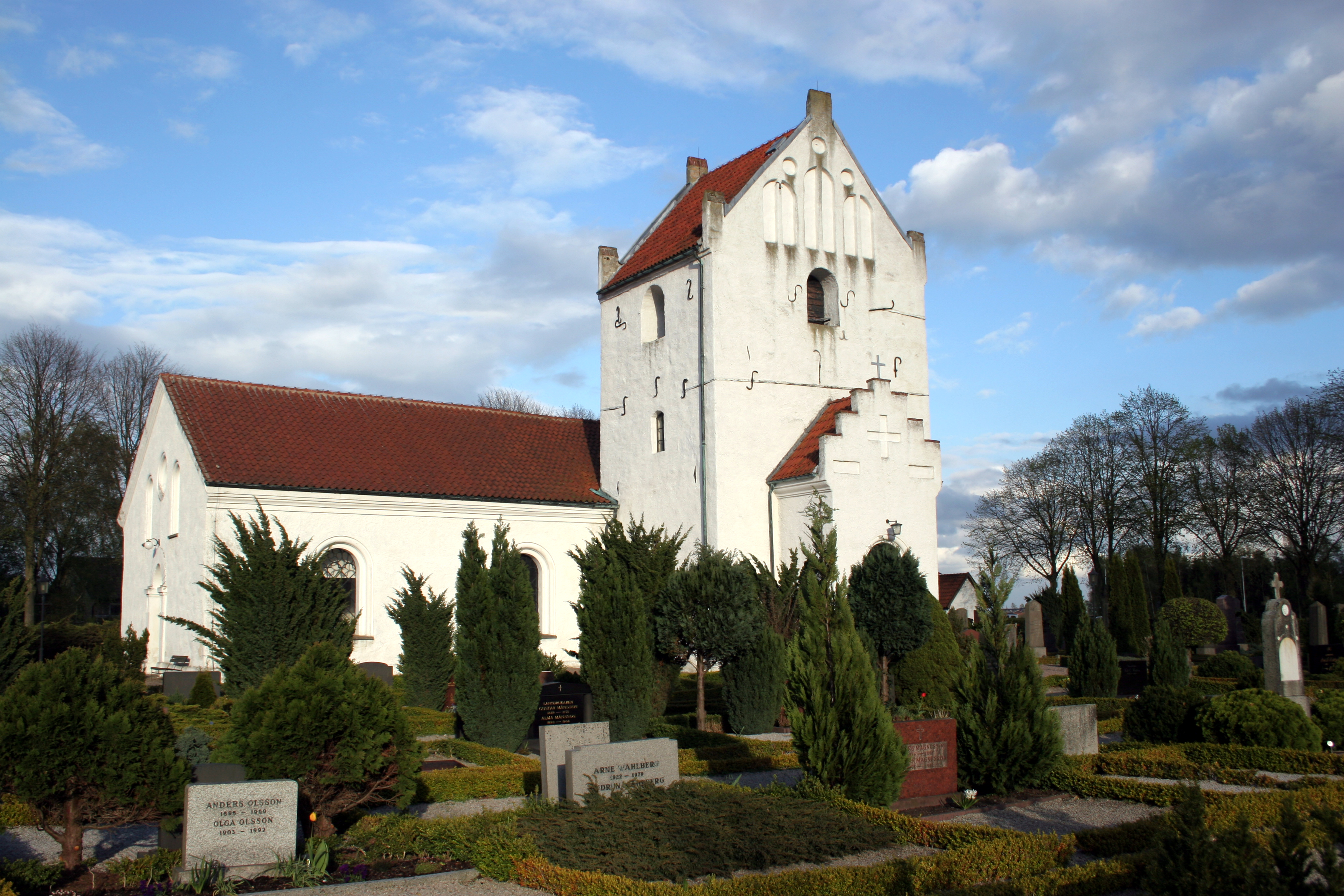 Annelövs kyrka, Scania, Sweden